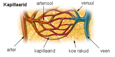 Pildil on põhimõtteline verevoolu skeem kudedes.